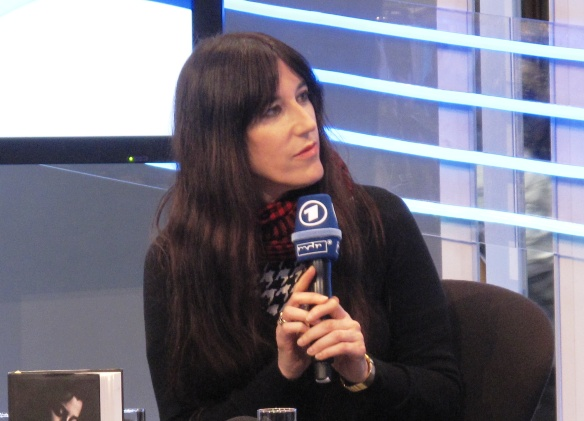 Zeruya Shalev - Leipziger Buchmesse 2012